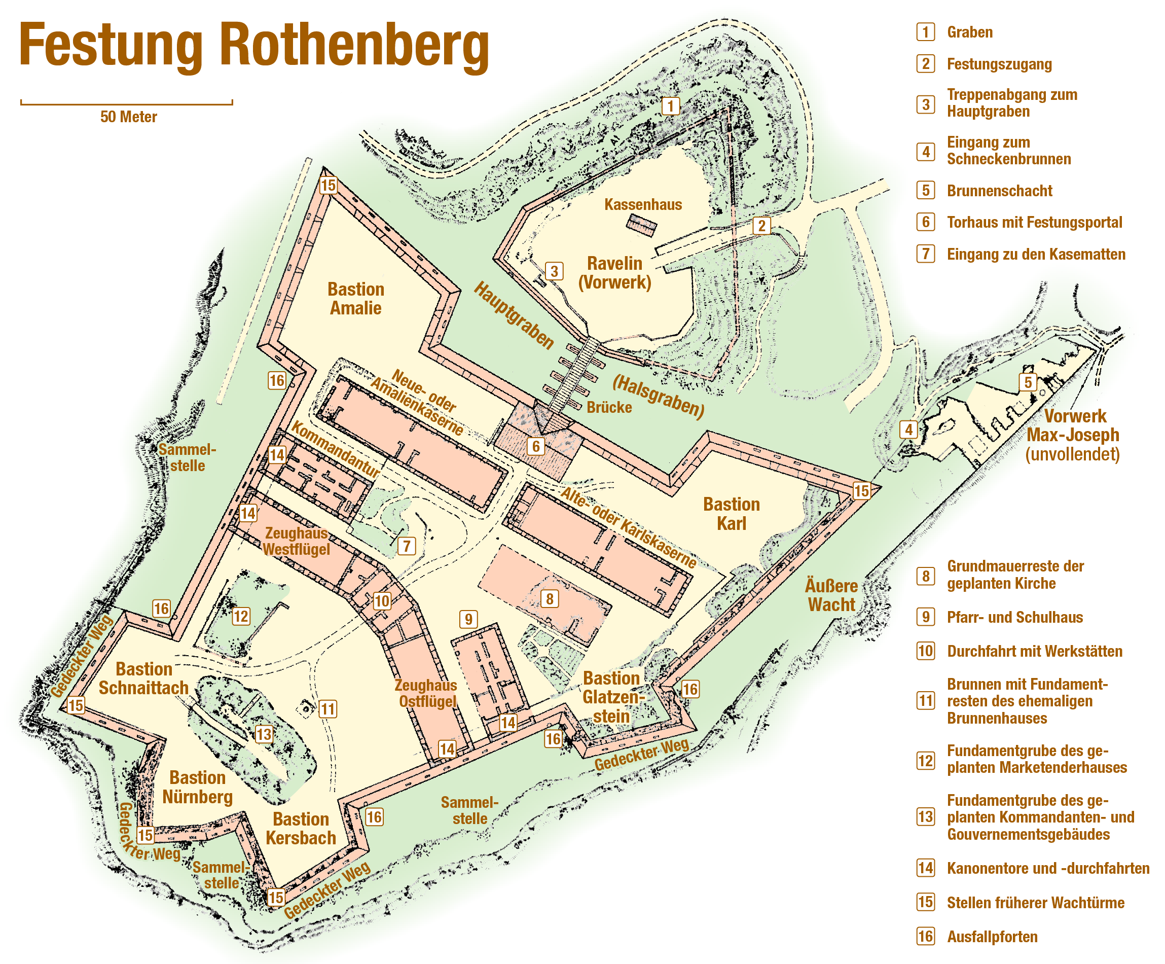 Karte der Festung Rothenberg